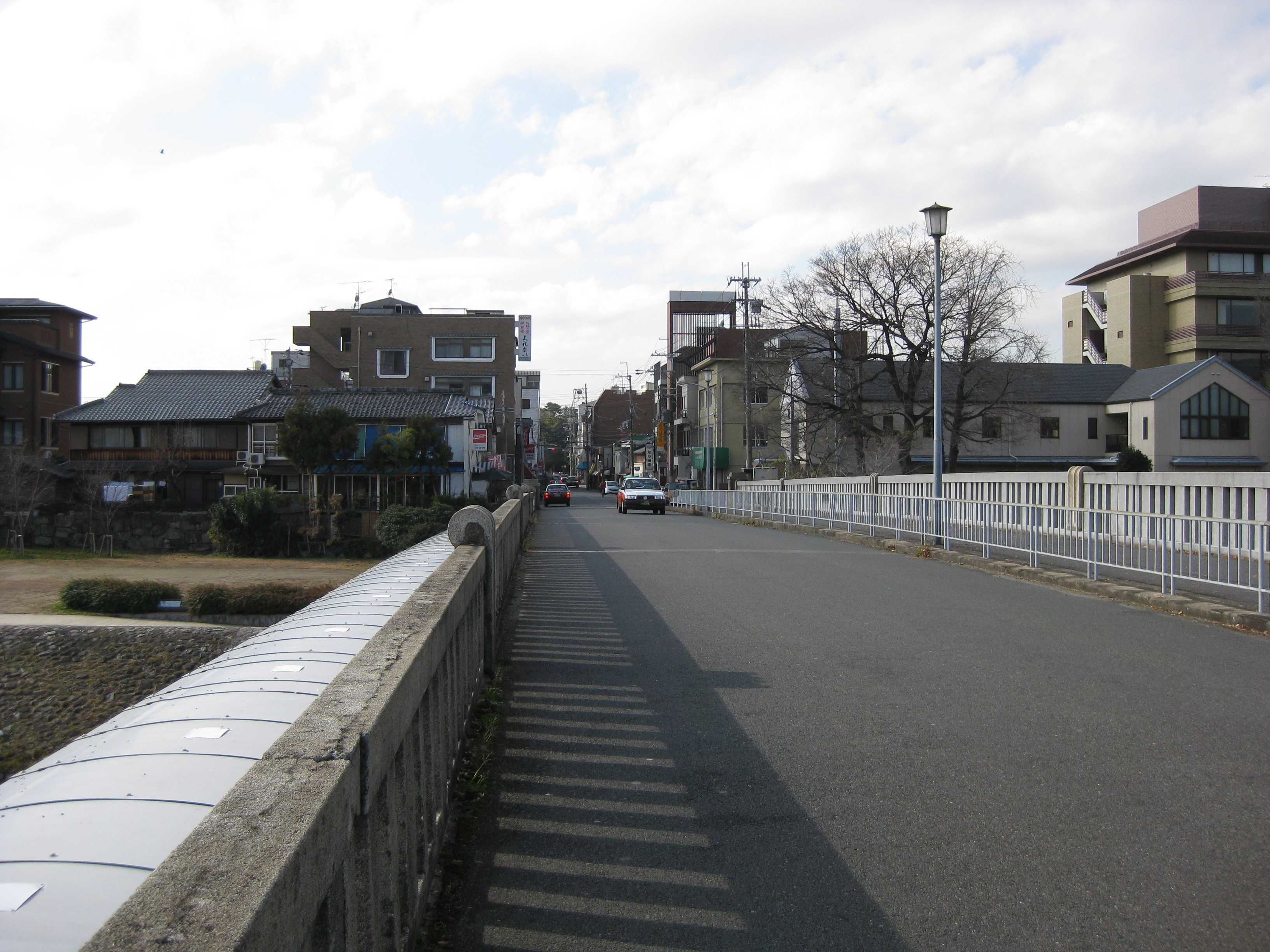 京都市上京区 荒神橋上より西方面